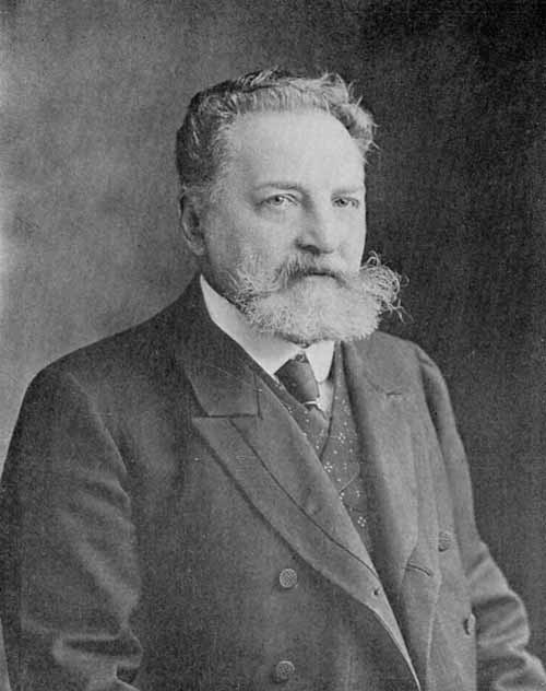 Батюшков, Фёдор Дмитриевич